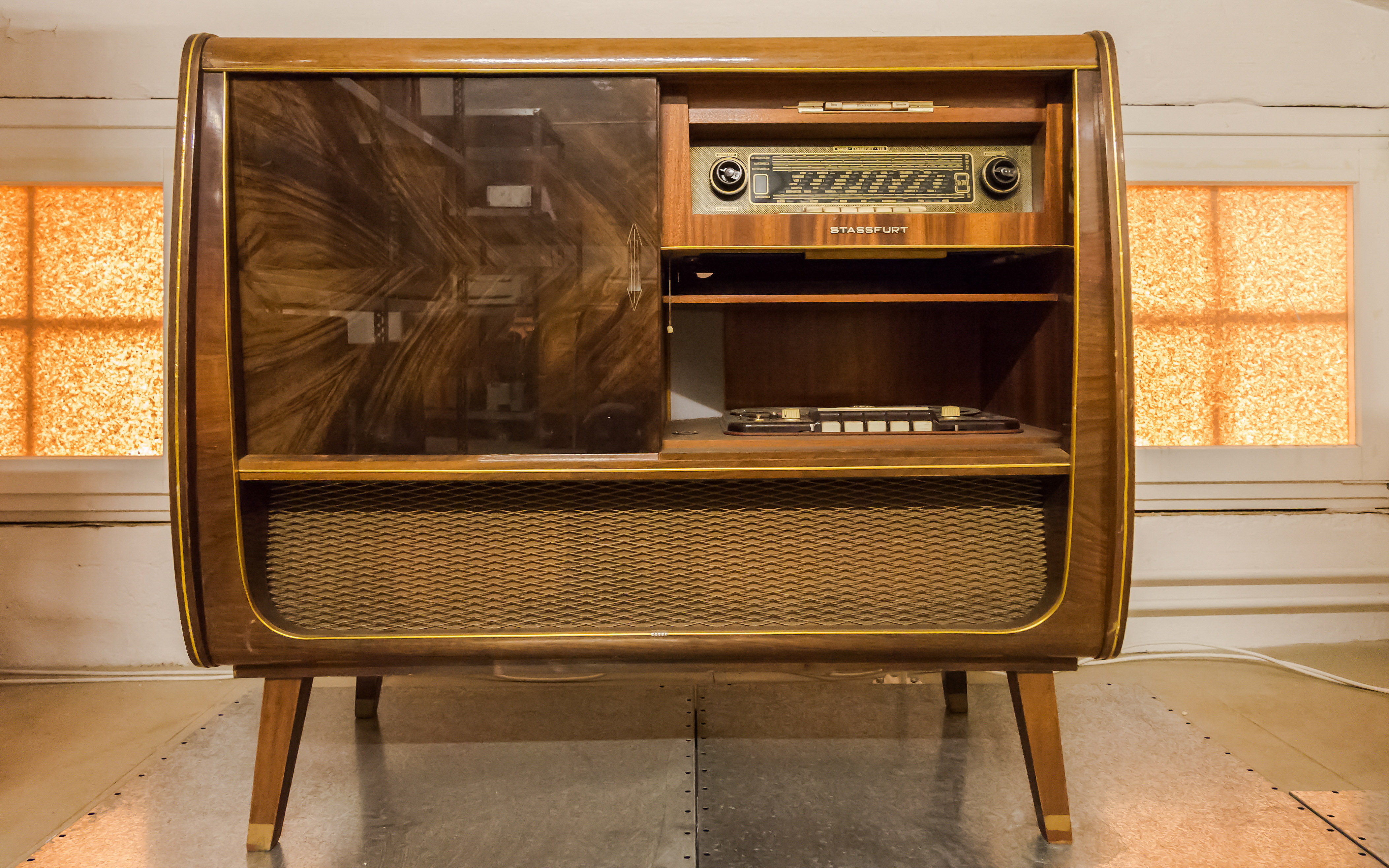 TSD Depot Unterhaltungs-, Ton-, Radio- und Fernsehtechnik ,RFT Musikschrank Stassfurt Röhren Fernseher Radio Tonband II